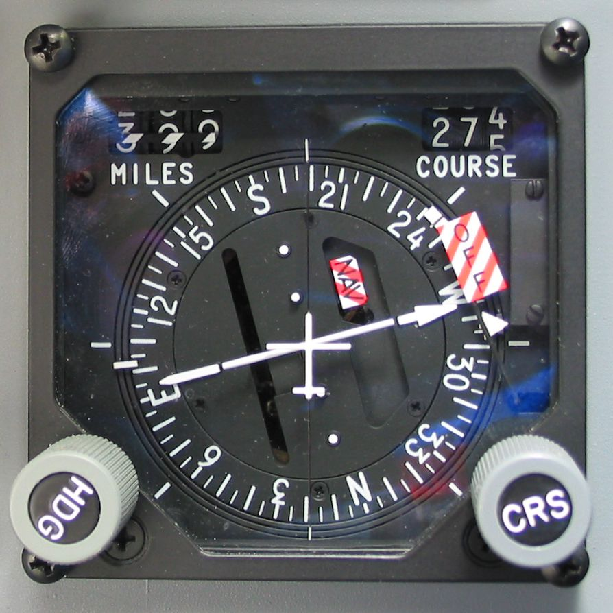 Ukazatel horizontální situace (HSI) letounu L-159 ALCA